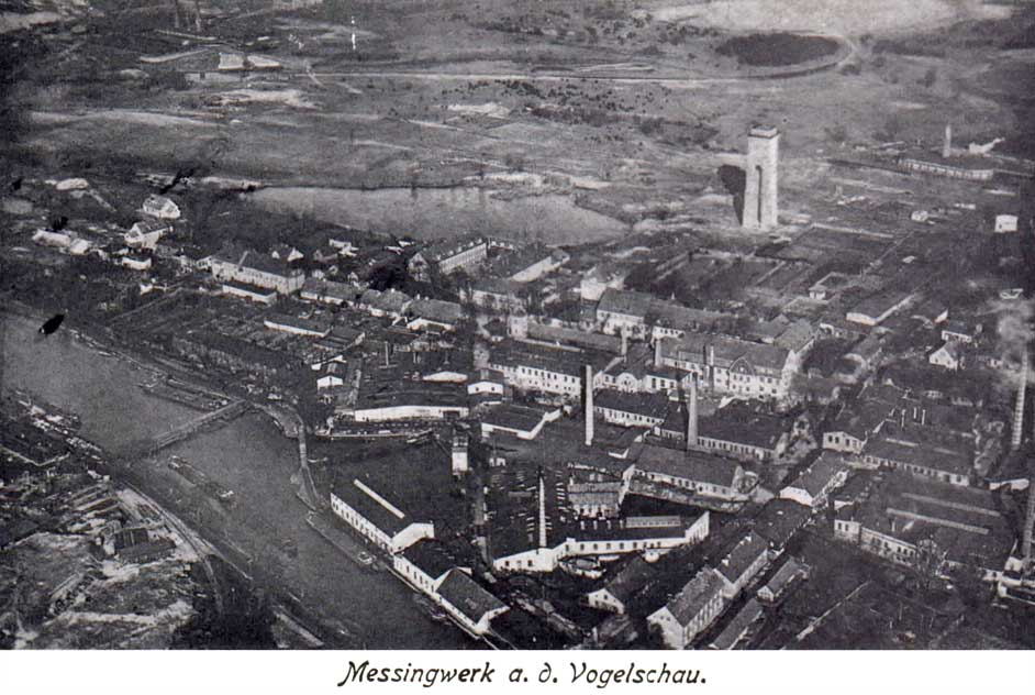 Ortschaft Messingwerk bei Eberswalde am Finowkanal (heute Ortsteil von Eberswalde-Finow), Produktionsanlagen der Hirsch Kupfer- und Messingwerke AG (HKM) mit dem Hafenbecken am Finowkanal und dem 1918 fertiggestellten Wasserturm